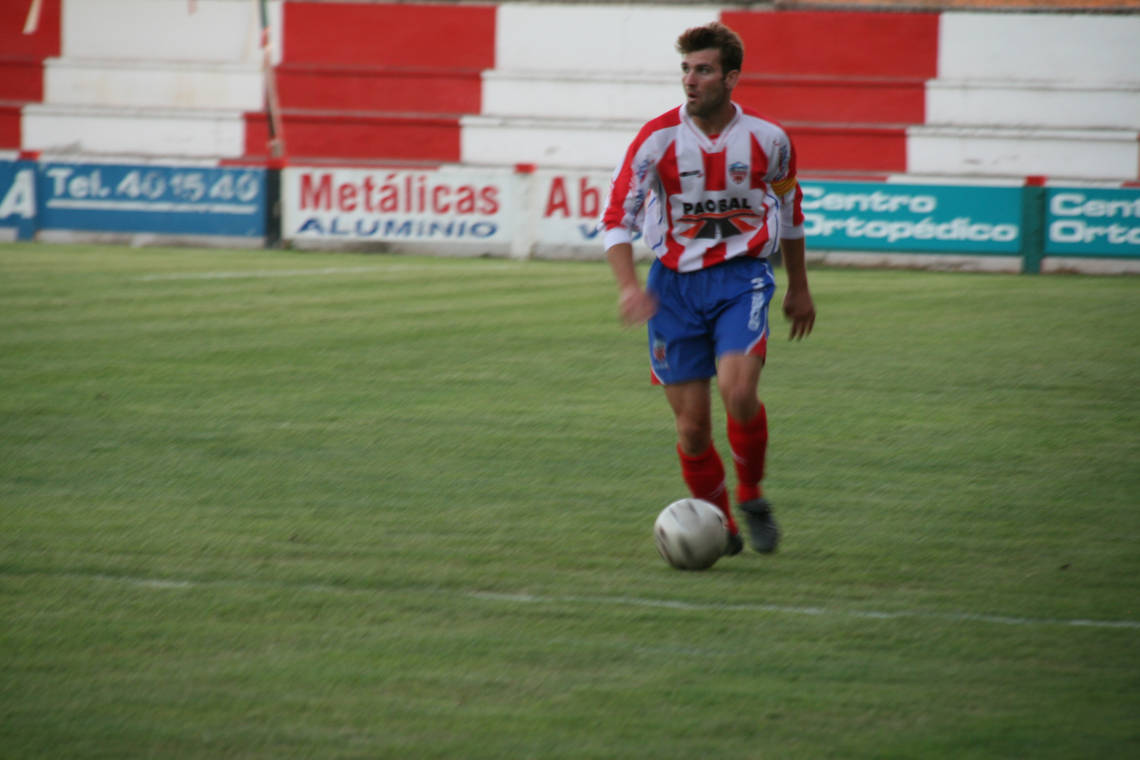 Jugador del Atlético Monzón contra el Reve Altorricón (08/08/2007)